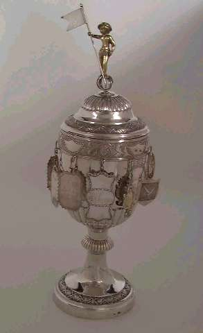 Skreddersvennenes velkomst i Christiania, sølv, datert 1821, mester: Ahasversus Kaas. Høyde 41.5 cm. Norsk Folkemuseum. NF. 1909-0117.